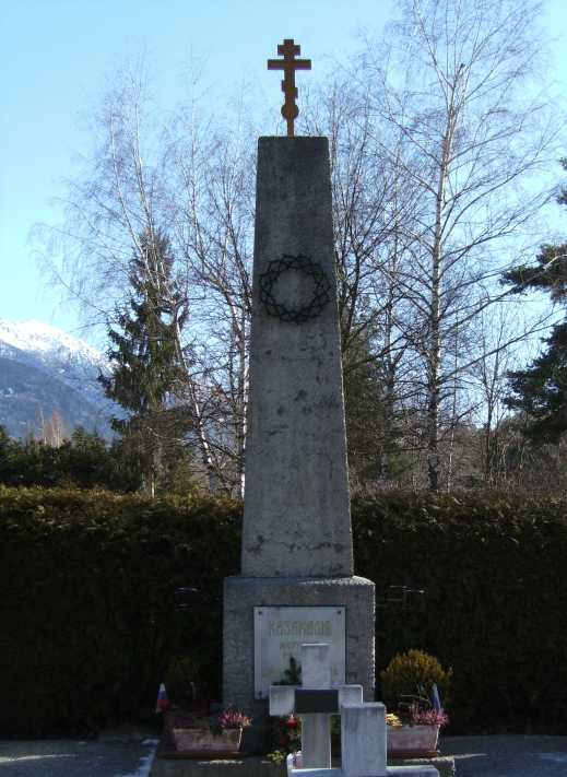 Kosakenfriedhof